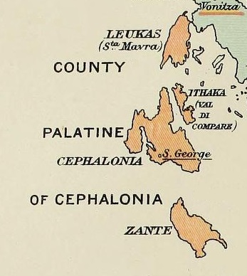 El Condado palatino de Cefalonia y Zante